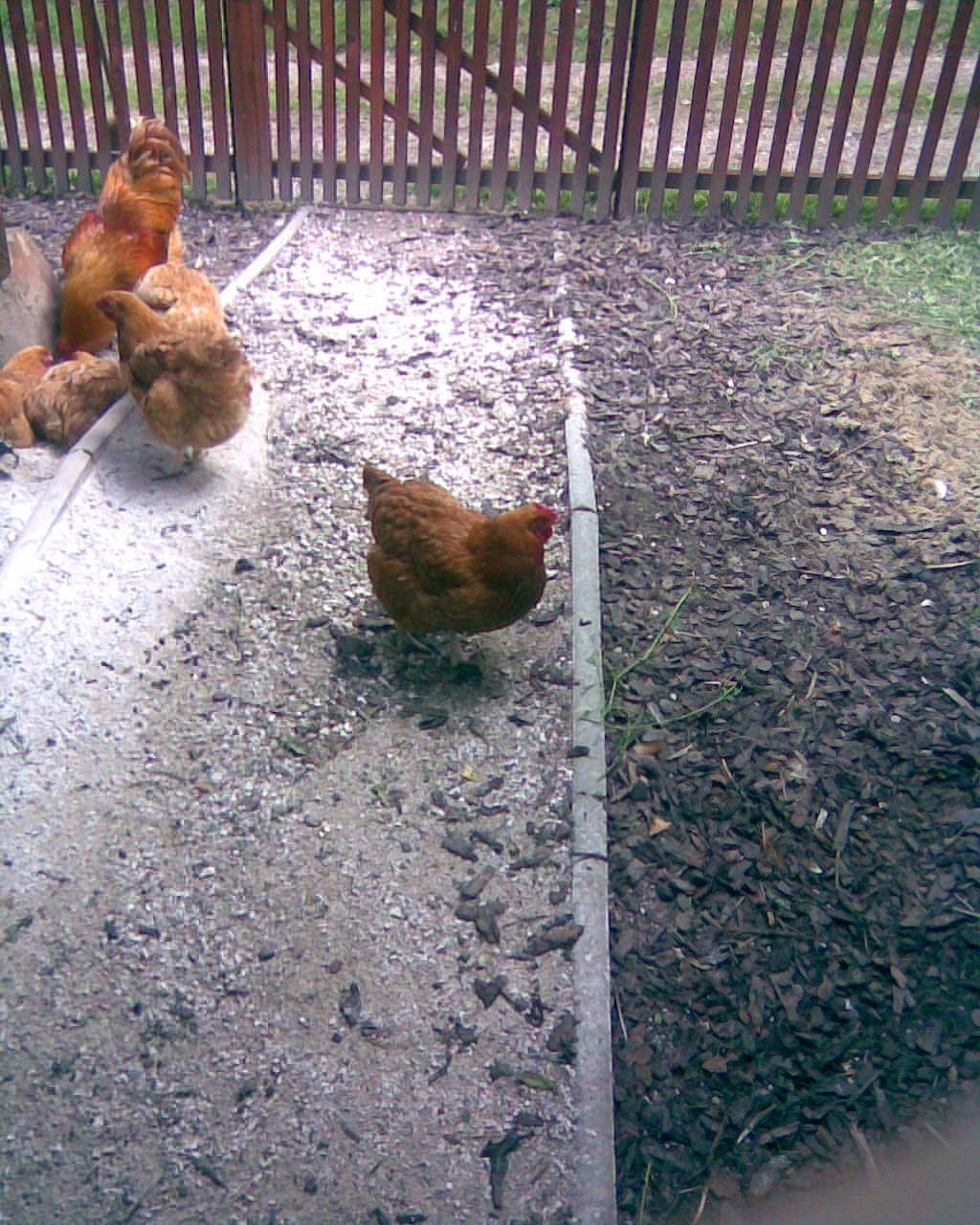 hen